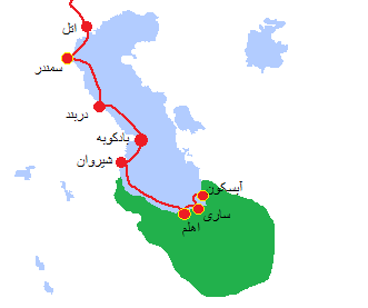 راه دریایی تجارت در زمان شاه غازی رستم باوندی بر پایه اطلاعات دکتر زمانه حسن‌نژاد